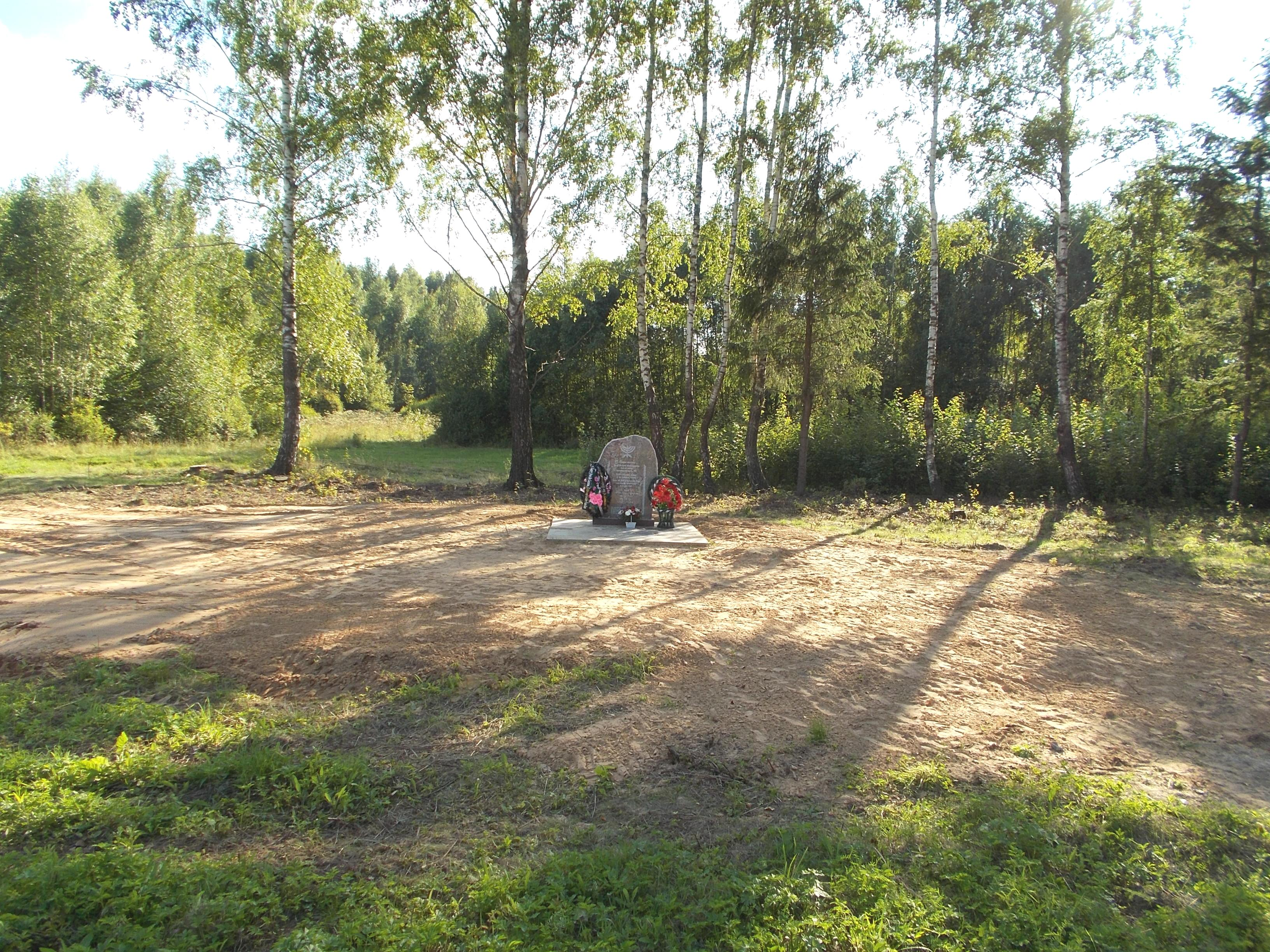 Место расстрела более ста евреев - узников гетто в Борковичах (Верхнедвинский район) осенью 1941 года. Справа от шоссе в направлении к югу (на Дисну), напротив южной околицы деревни Магеры, около ста метров от дороги.